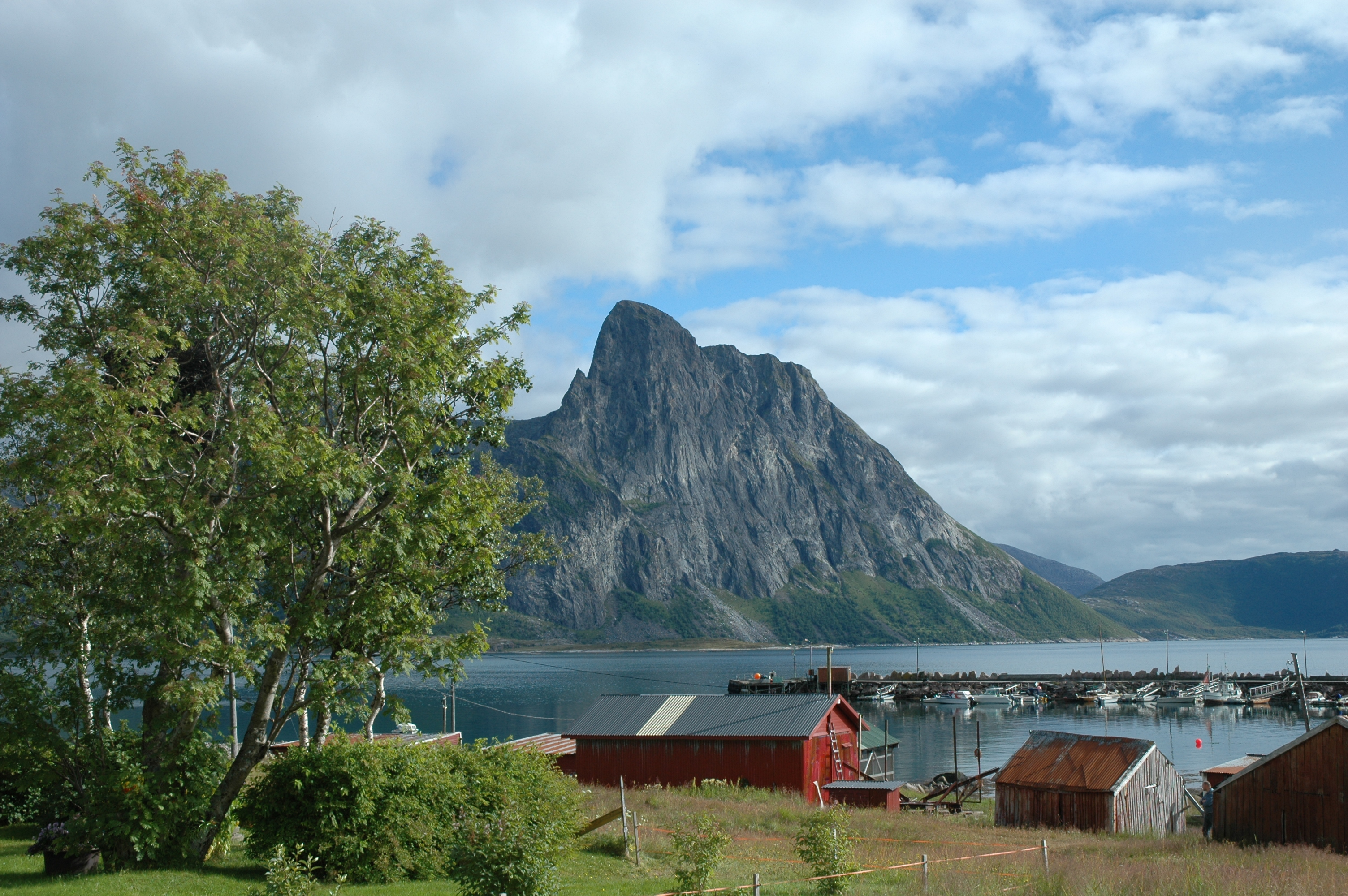 Flakstadvåg in Torsken, Norway